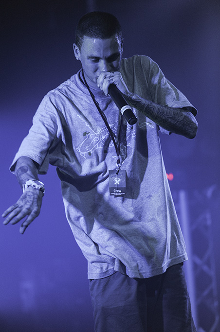 Kerser